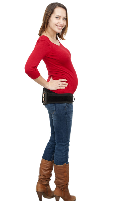 Die ergoloc sitzt unterhalb des Bauchansatzes